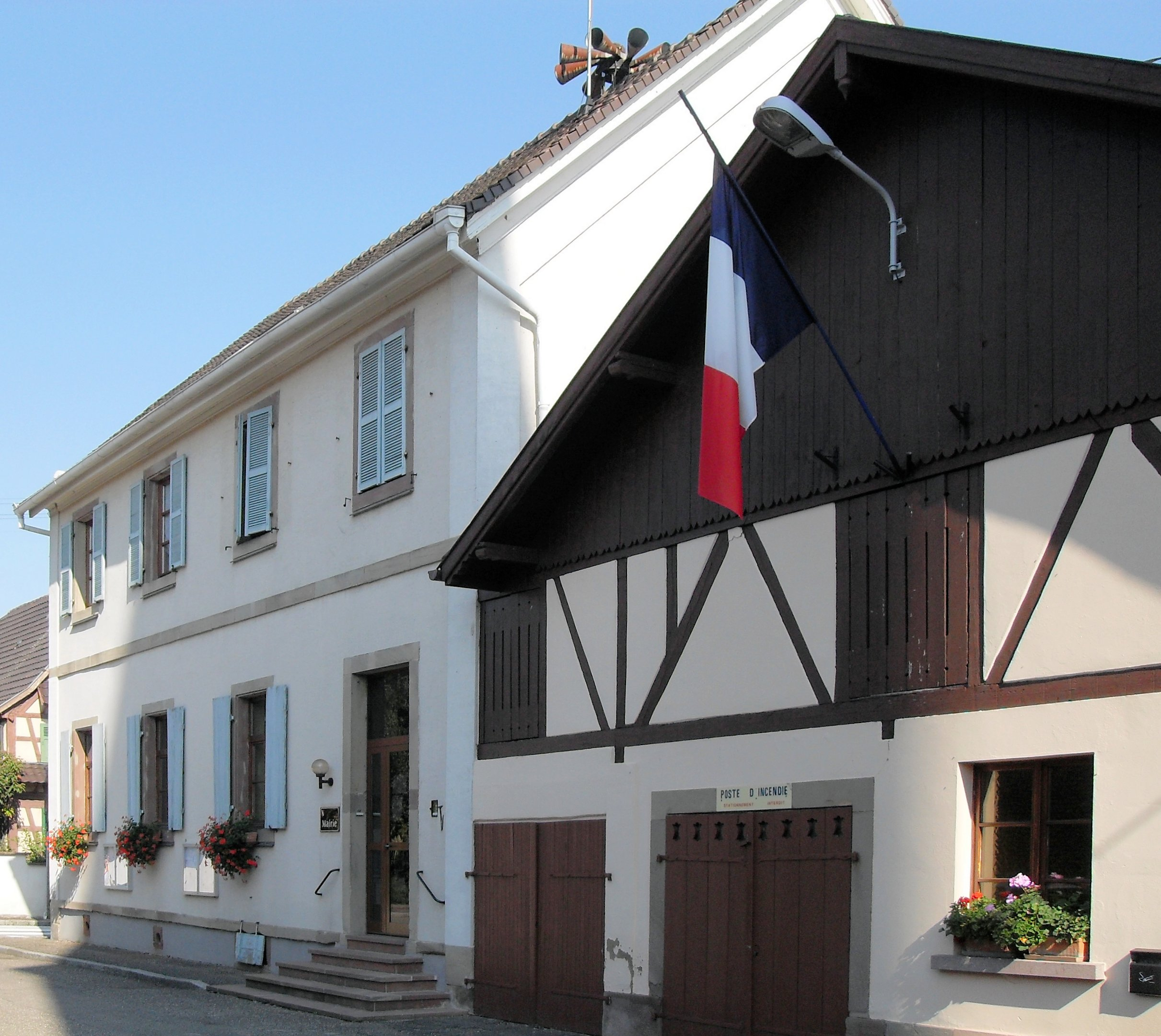 La mairie de Richtolsheim